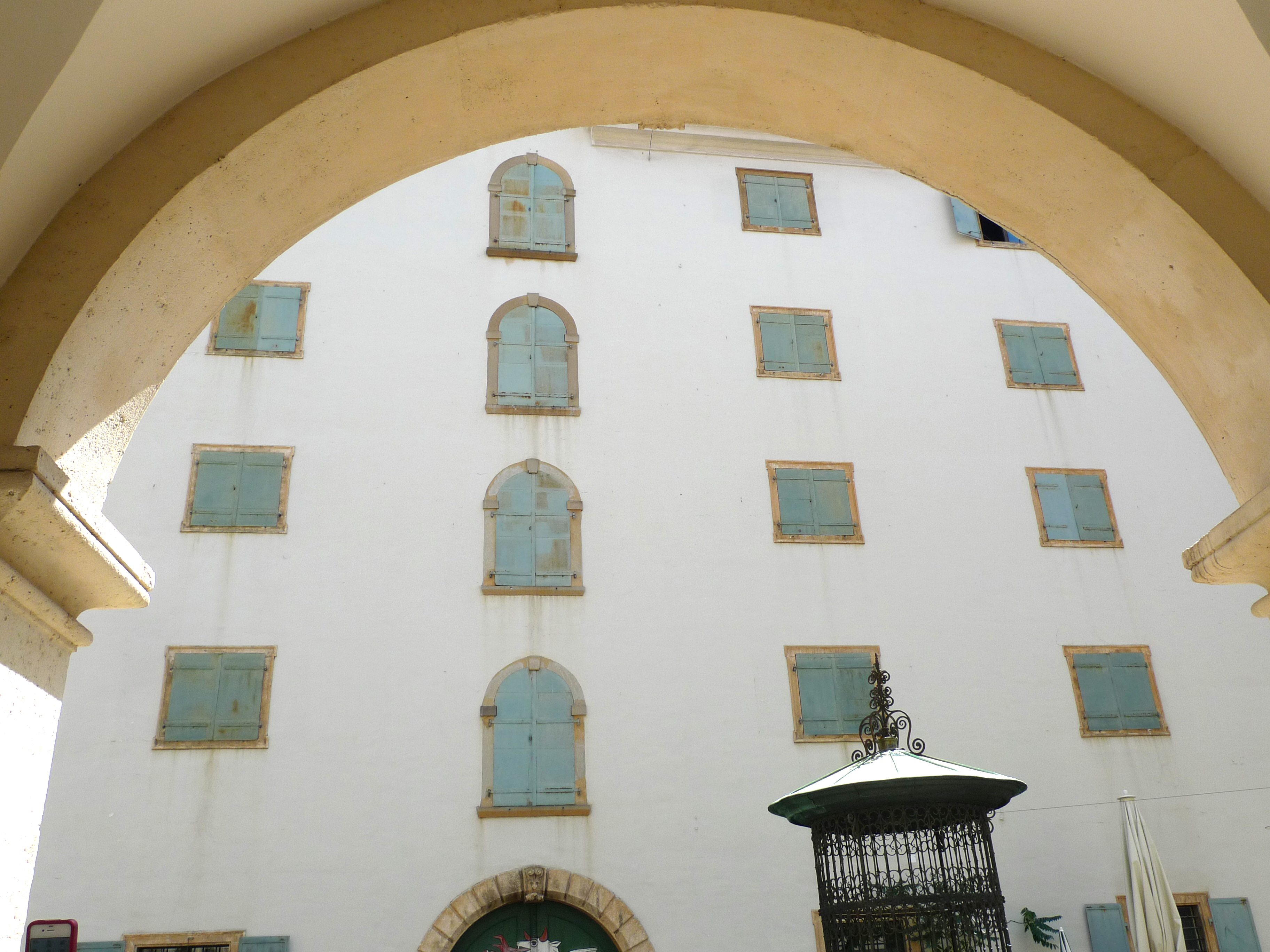 Landeszeughaus, Hofseite